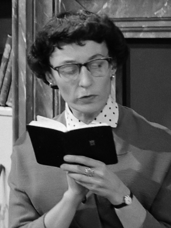 Televisiespel "Alles in tweevoud", met Mieke Verstraete, Kees Brusse en Annie Leenders 3 februari 1960